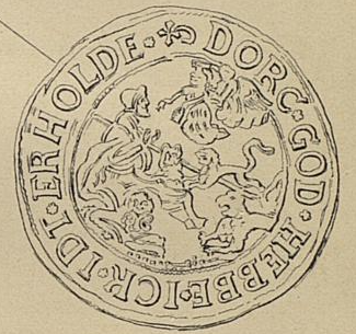 Danieltaler der Herrschaft Jever o. J. Rückseite